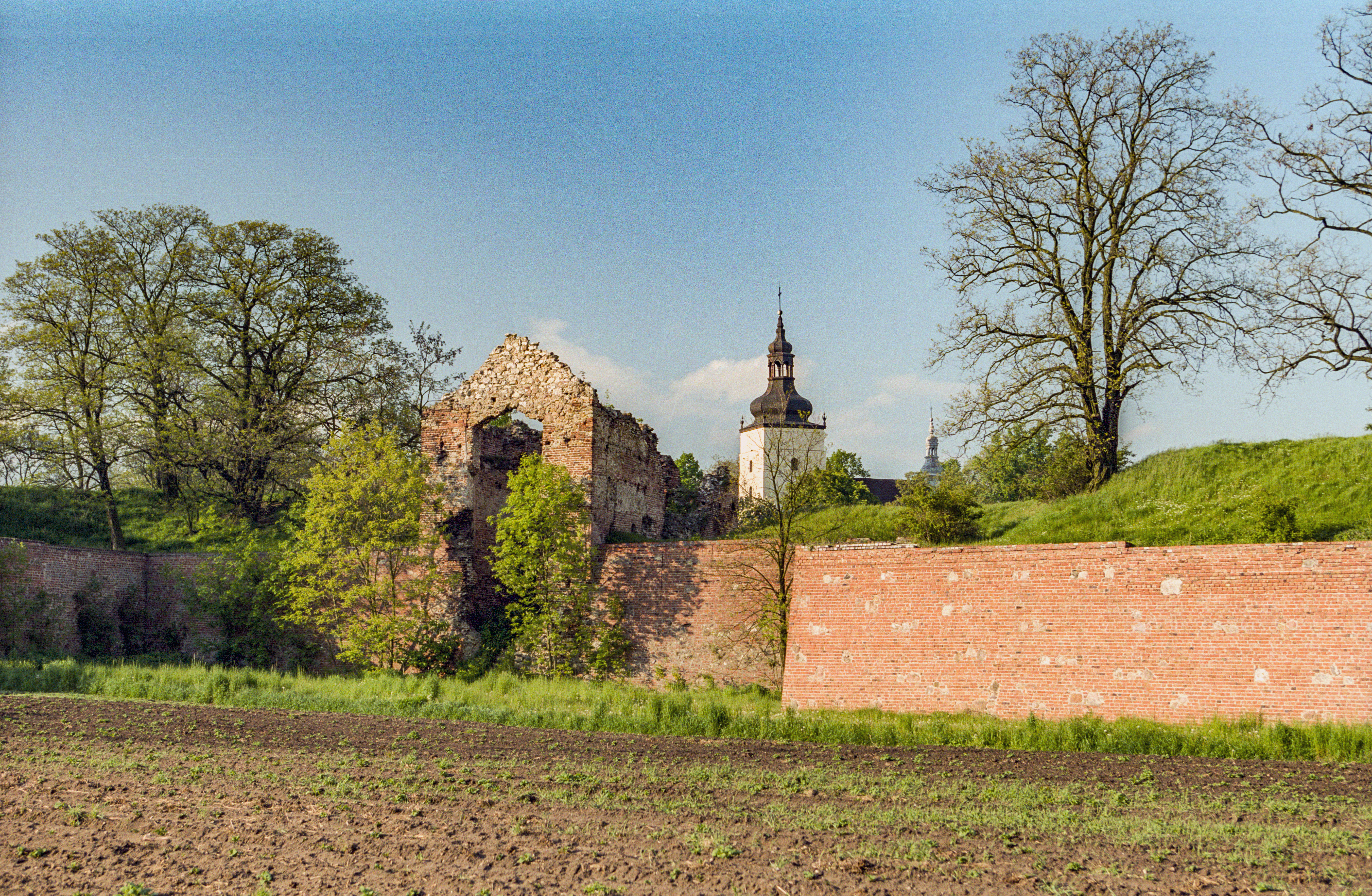 Danków, fortyfikacje bastionowe